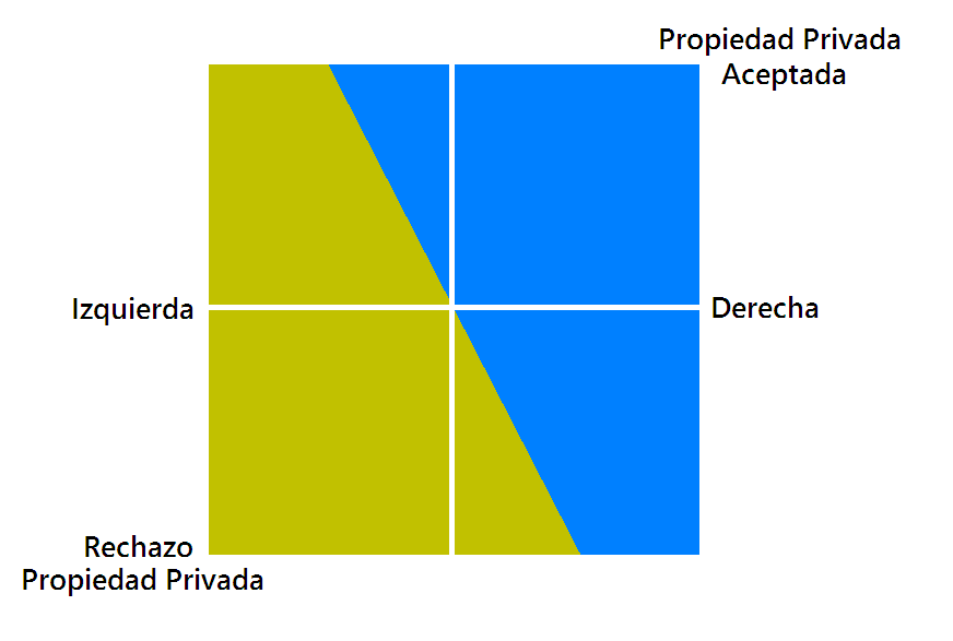 Esquema que muestra la aceptación o rechazo de la propiedad privada en el mapa político.